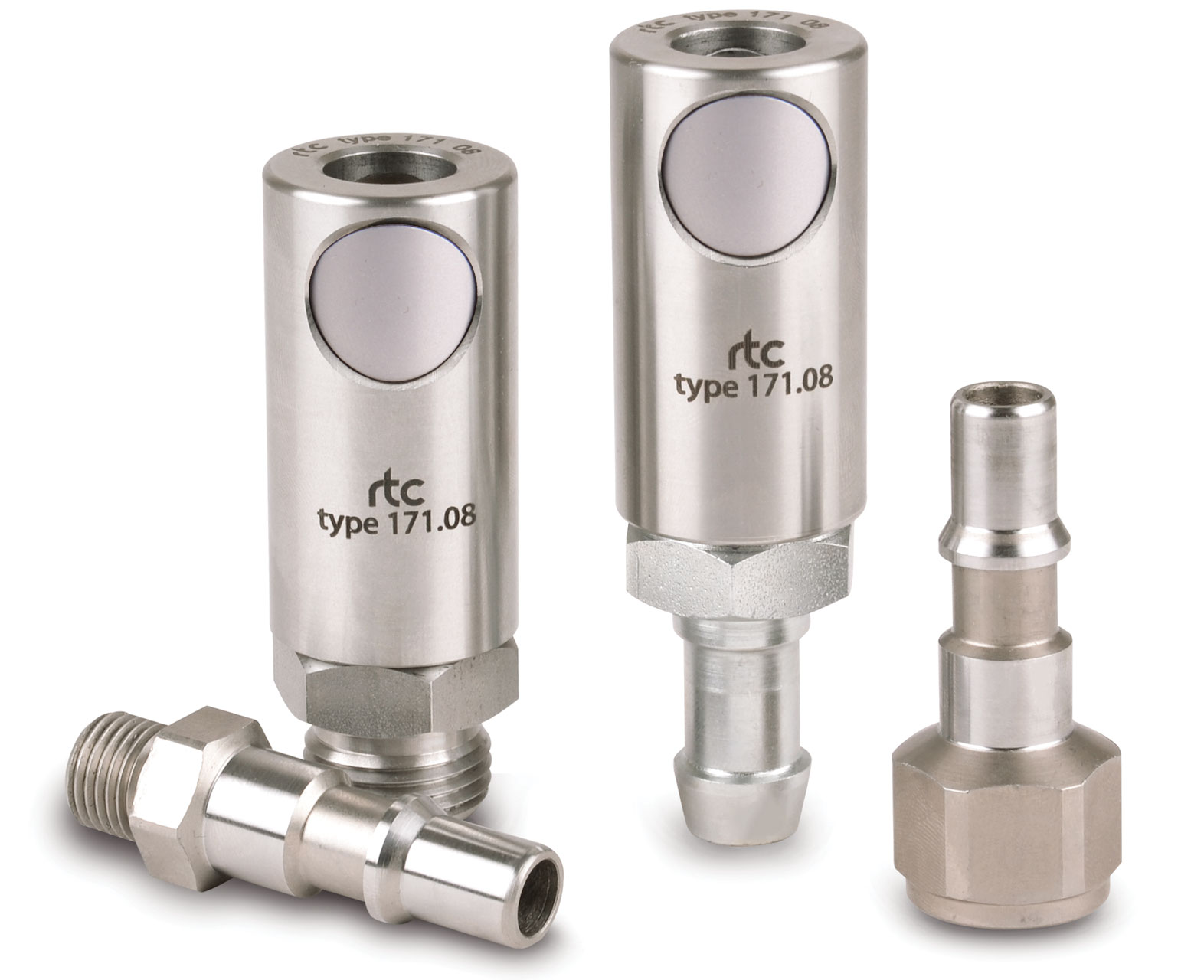 Pneumatikkupplung mit 2-Stufen-Sicherheitsentriegelung, gemäß ISO 4414 EN983 von einem der führenden Hersteller (RTC Couplings) für Kupplungssysteme.